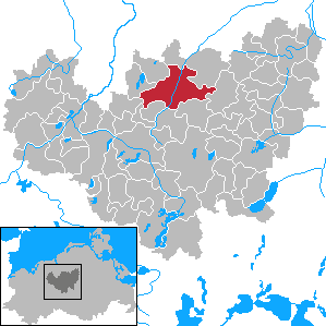 Laage in Mecklenburg-Vorpommern - District Güstrow